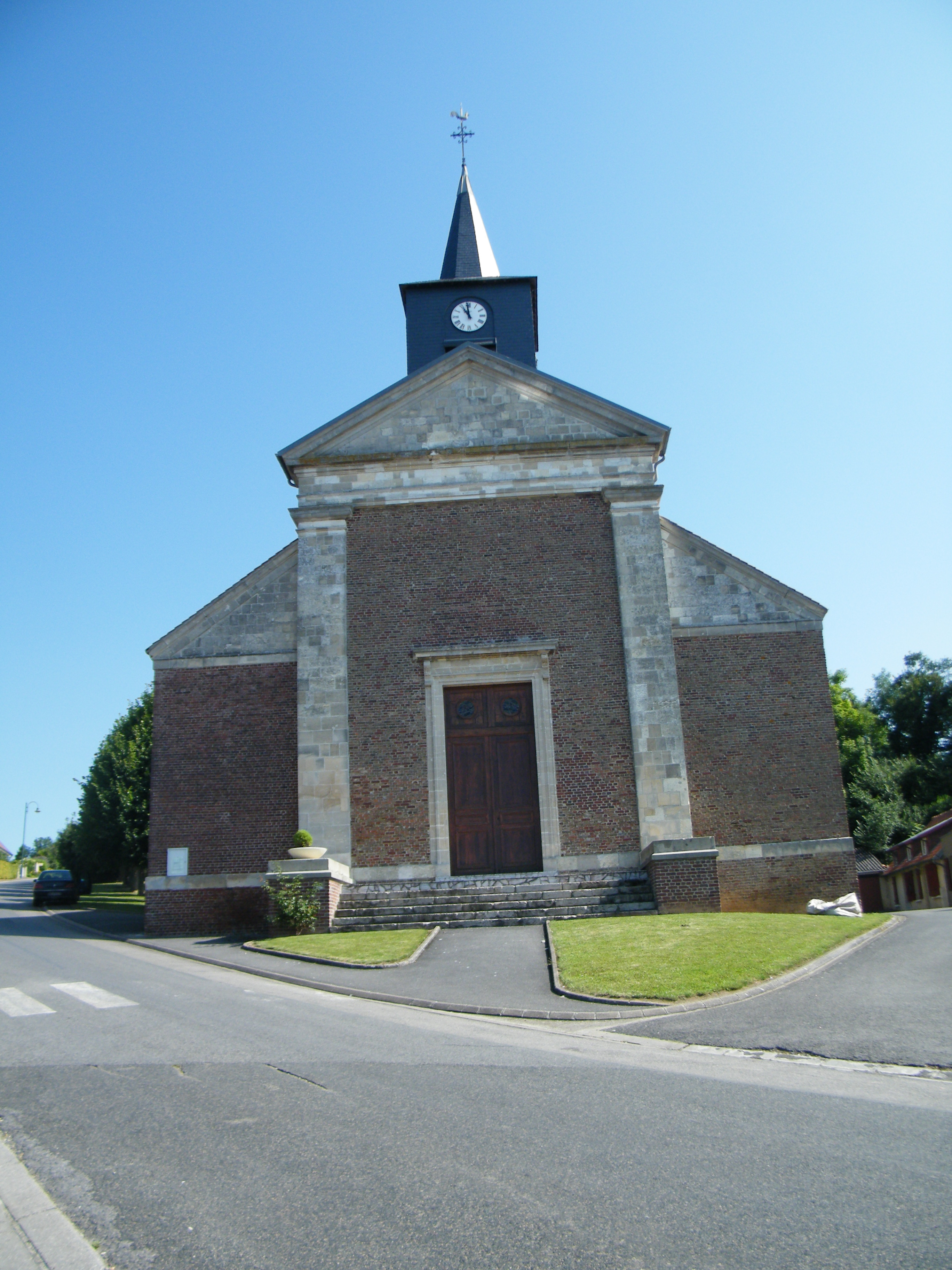 Vue du clocher. Église Saint-Martin